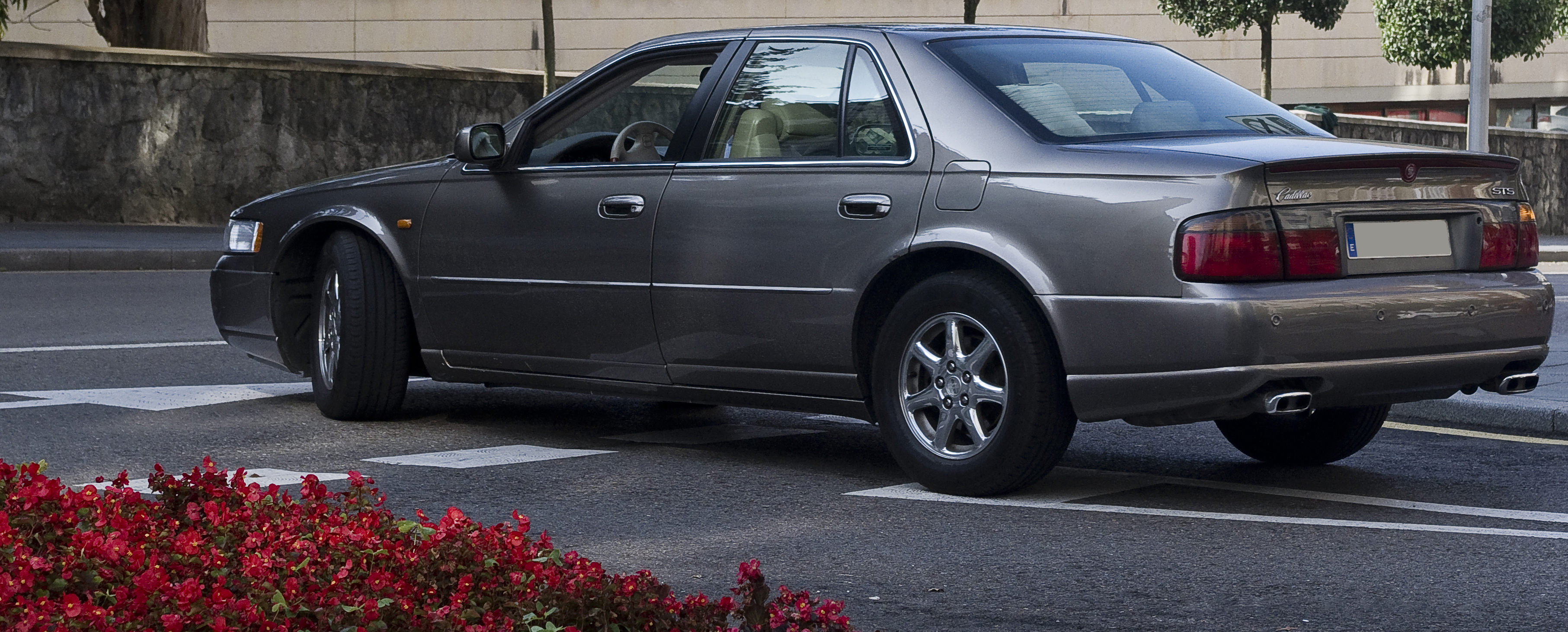 2001 Cadillac Seville STS